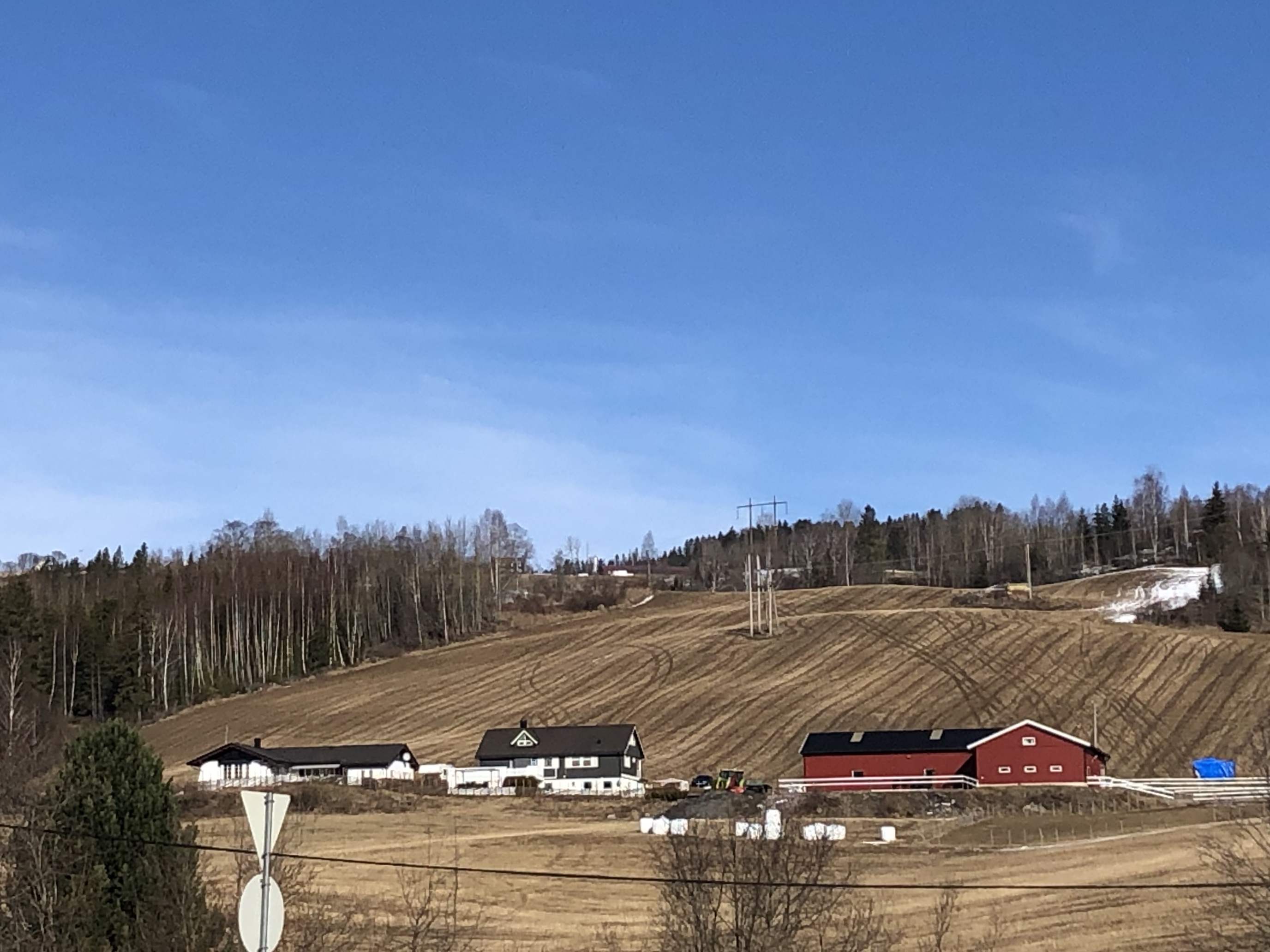 Vestre Løken gård, Leikvinvegen 55, Lunner